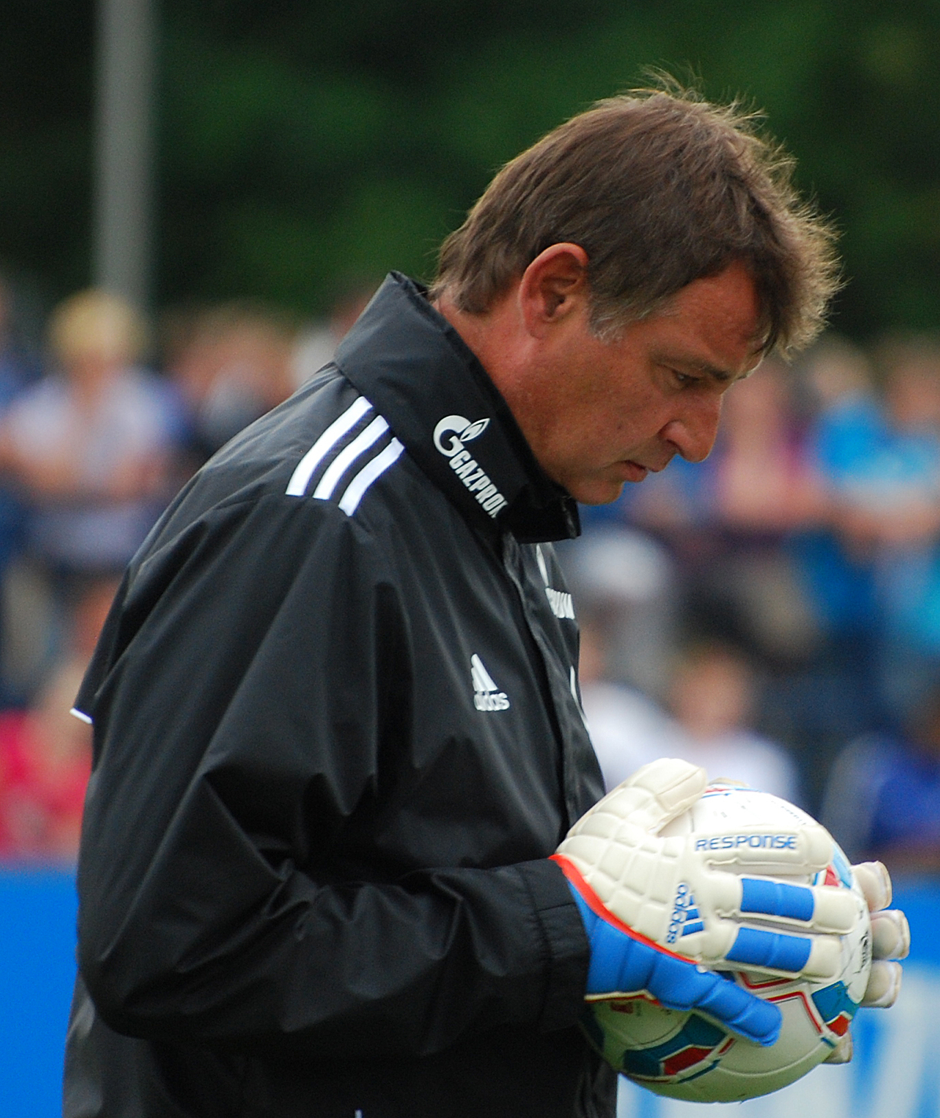 Bernd Dreher